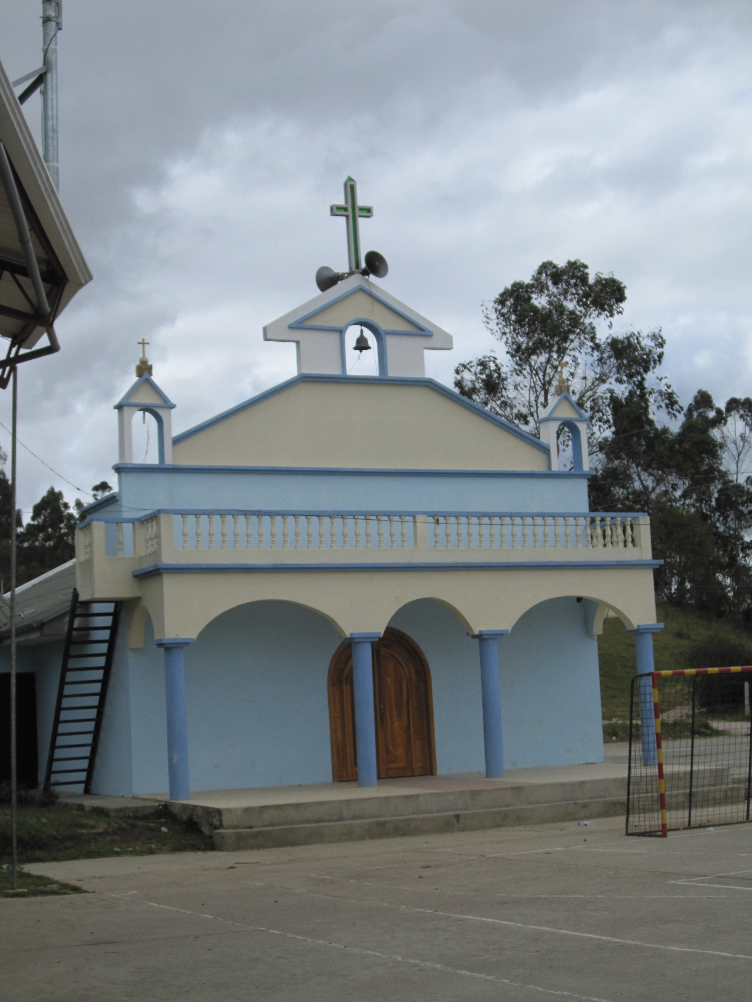 Church in Parcoloma, Ecuador.